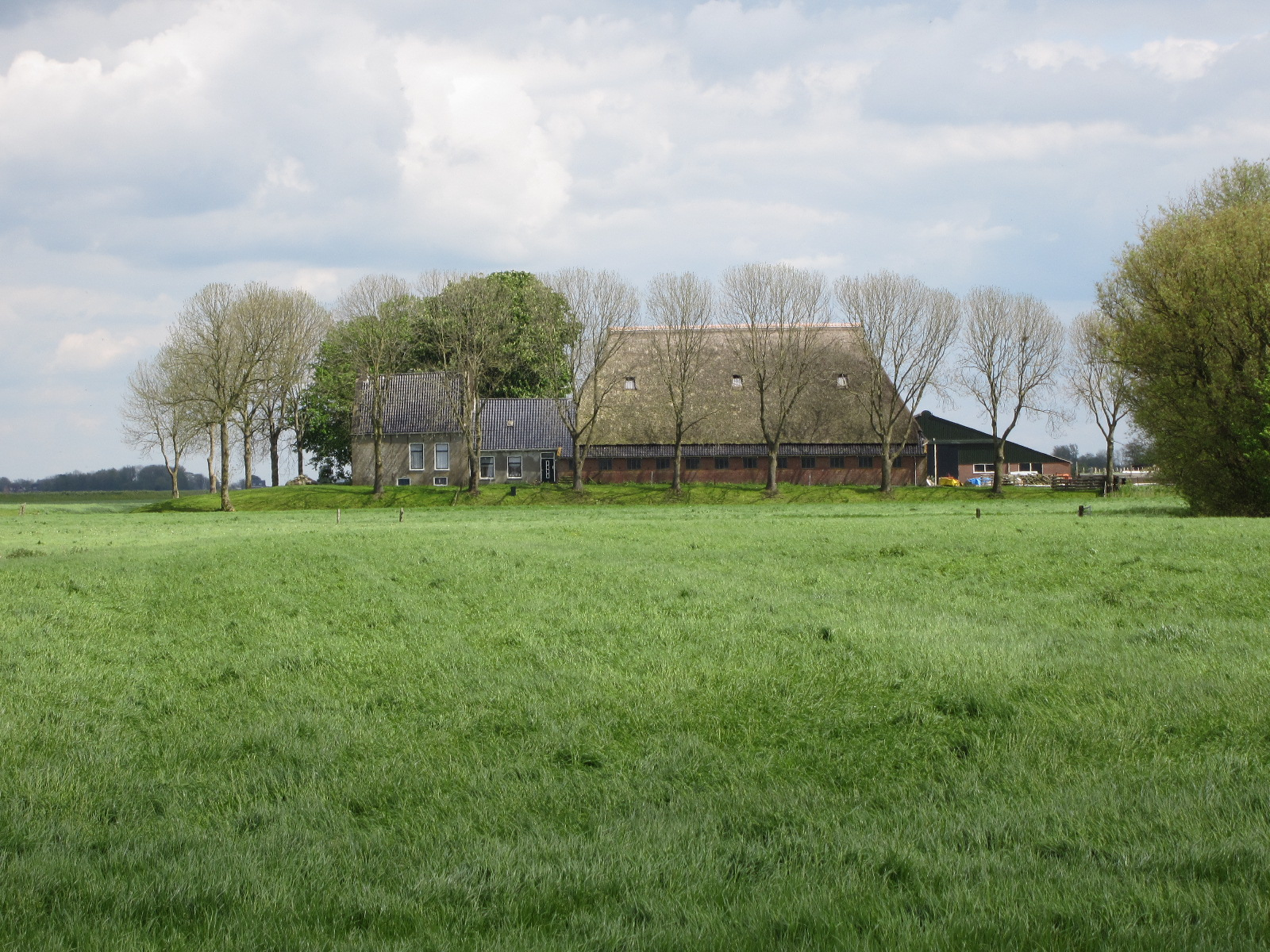 Buurtschap Westerburen (Fries: Westerbuorren), nabij Westergeest. Kop-hals-rompboerderij op een terprestant, aan het einde van de doodlopende weg naar het buurtschap. Hamlet Westerburen, near village Westergeest, county Friesland, The Netherlands. Headlong hull farm on a mound remnant.